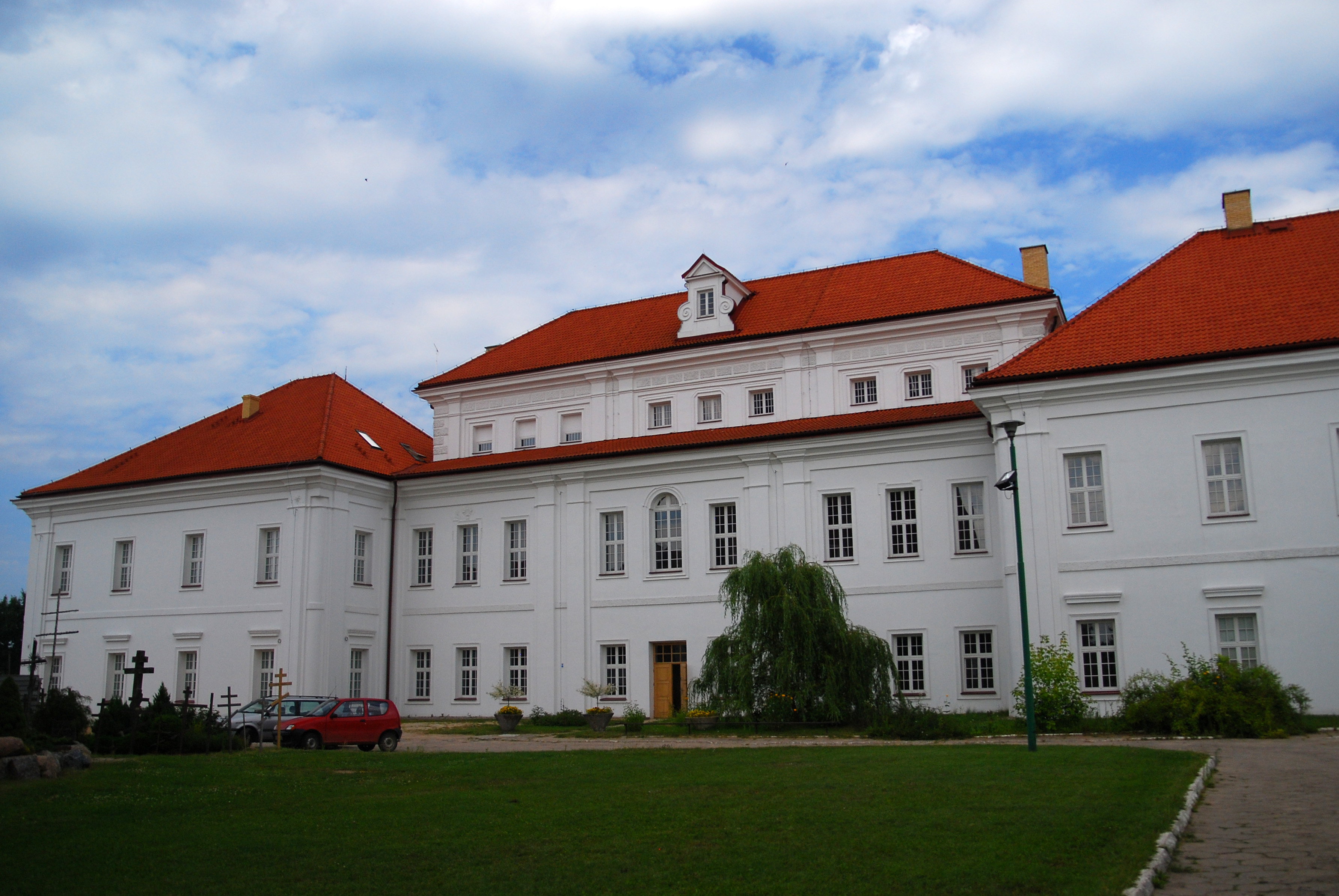 Supraśl - Pałac Archimandrytów w zespole klasztornym bazylianów This photo from Podlaskie Voievodeship was taken during Polish Wikiexpedition 2009 set up by Wikimedia Polska Association. The making of this document was supported by Wikimedia Polska.